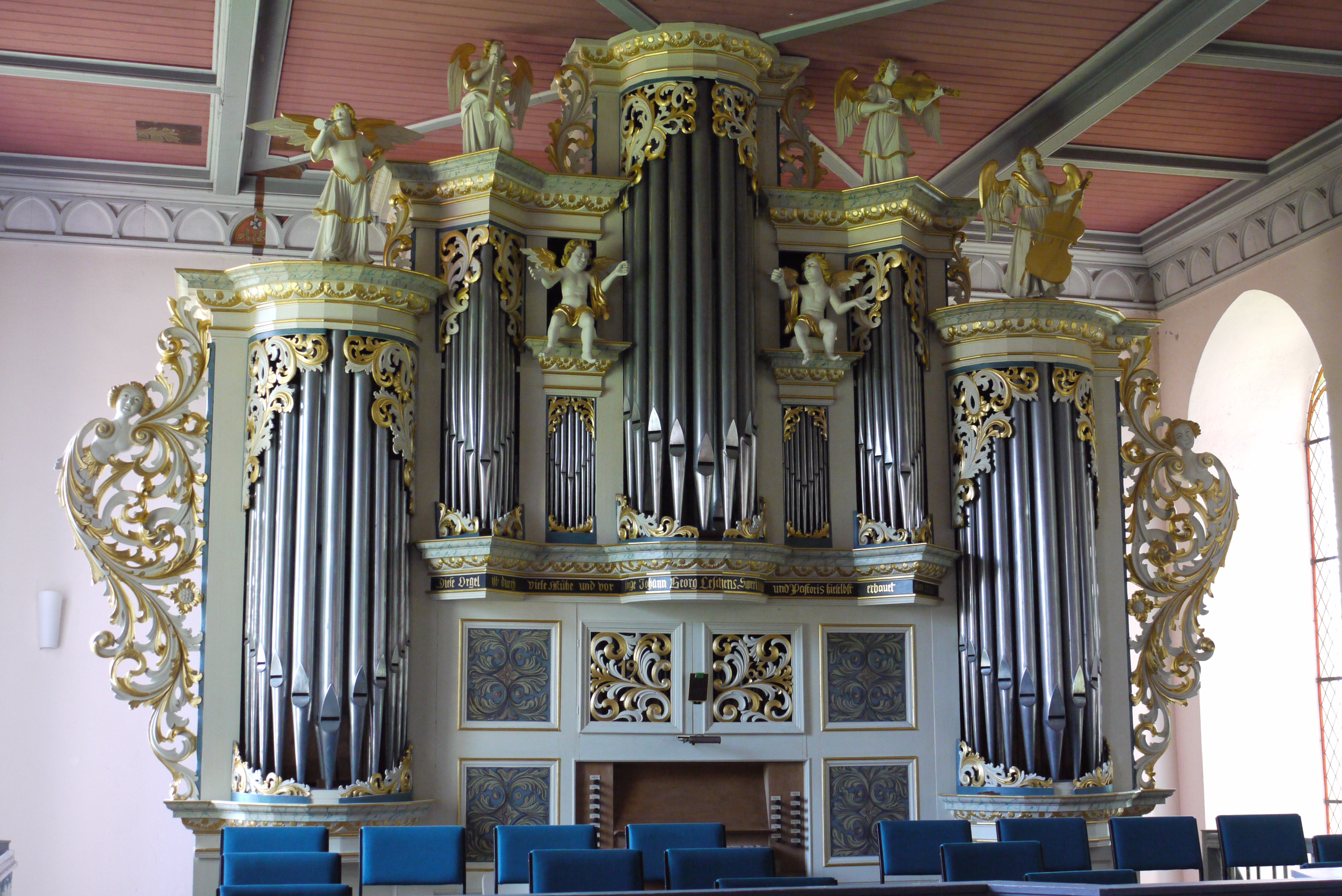 Janke-Orgel der Martinikirche in Northeim-Hohnstedt, Niedersachsen